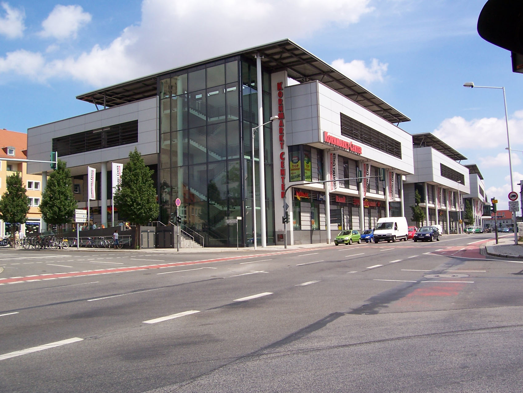 Kornmarktcenter in Bautzen, Westansicht. Hornjoserbsce: Žitnowičny center w Budyšinje ze zapada.